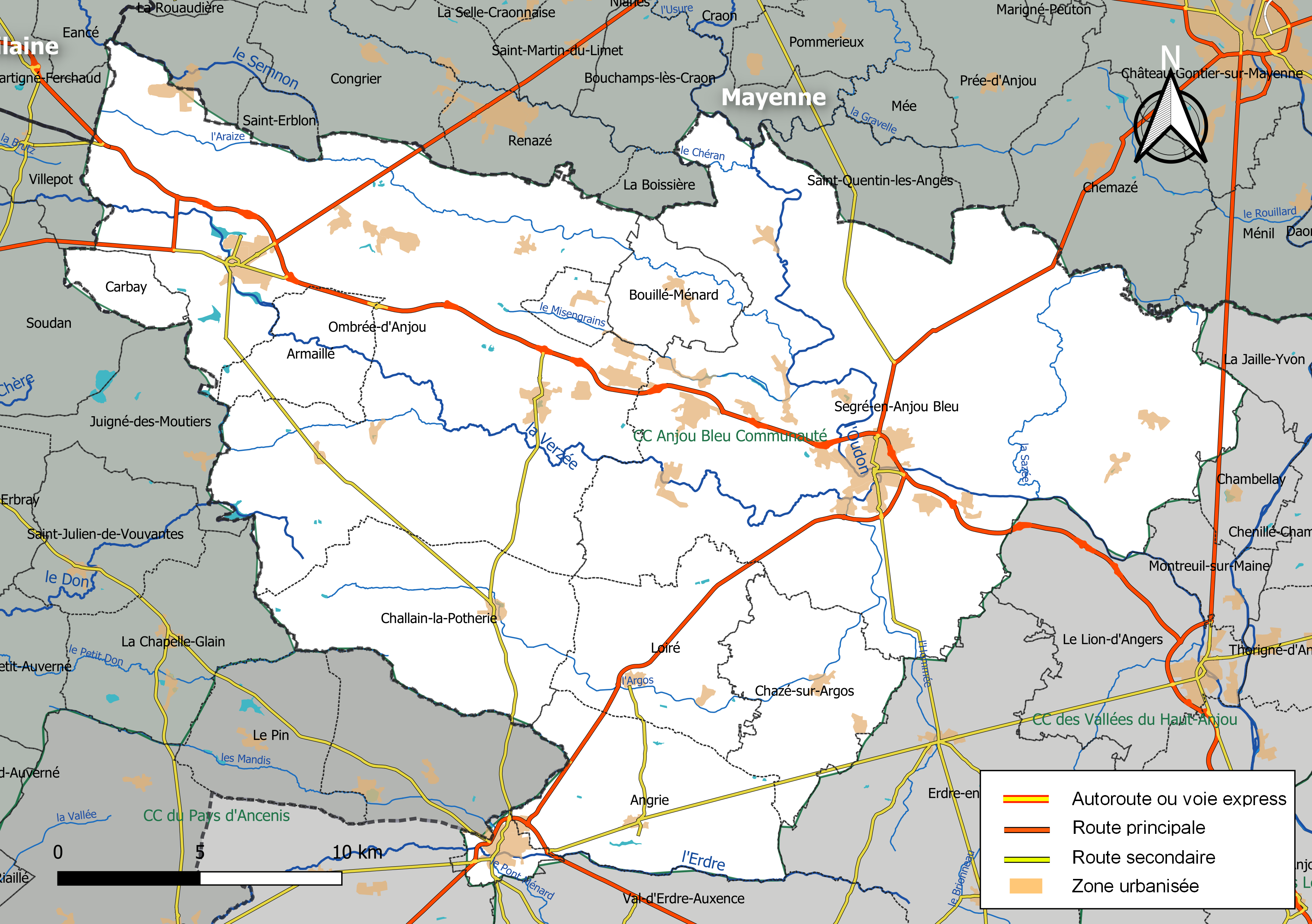 Carte géographique de l'intercommunalité Anjou Bleu Communauté, département de Maine-et-Loire, France. Composition au 1er janvier 2019.